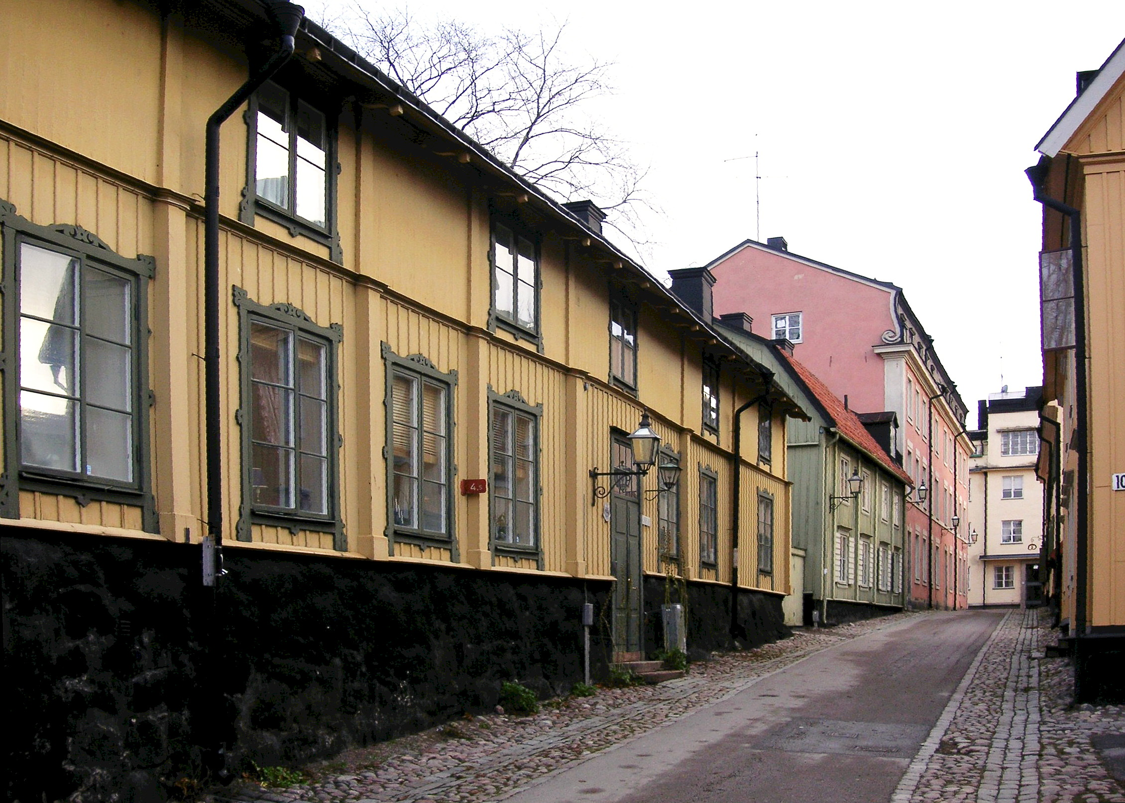 Djurgårdsstaden, Långa gatan, Stockholm